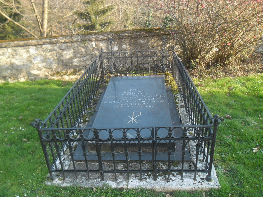 grob hrvatskoga bana Nikole Tomašića